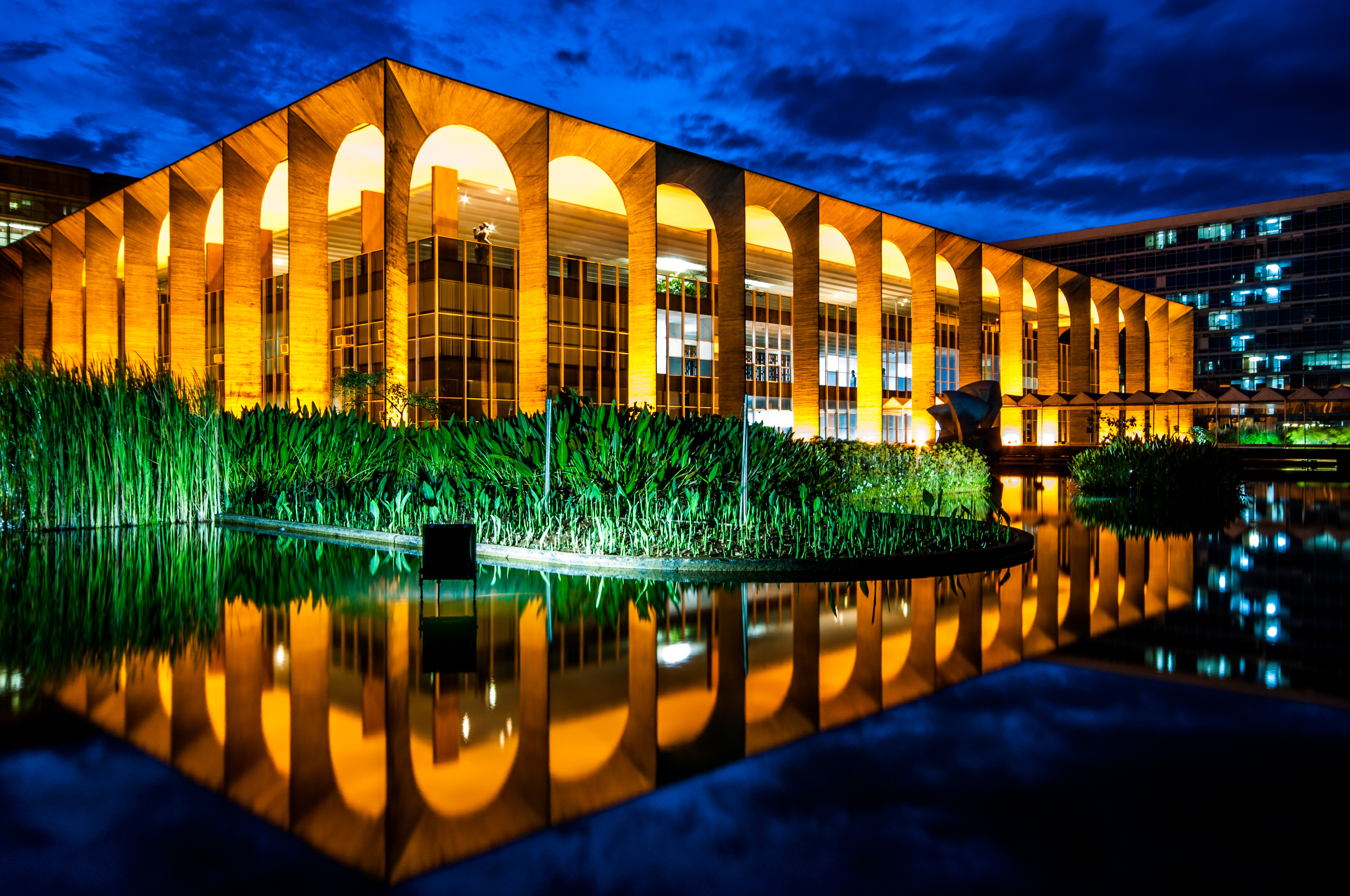 Forte de Santo Antônio da Barra